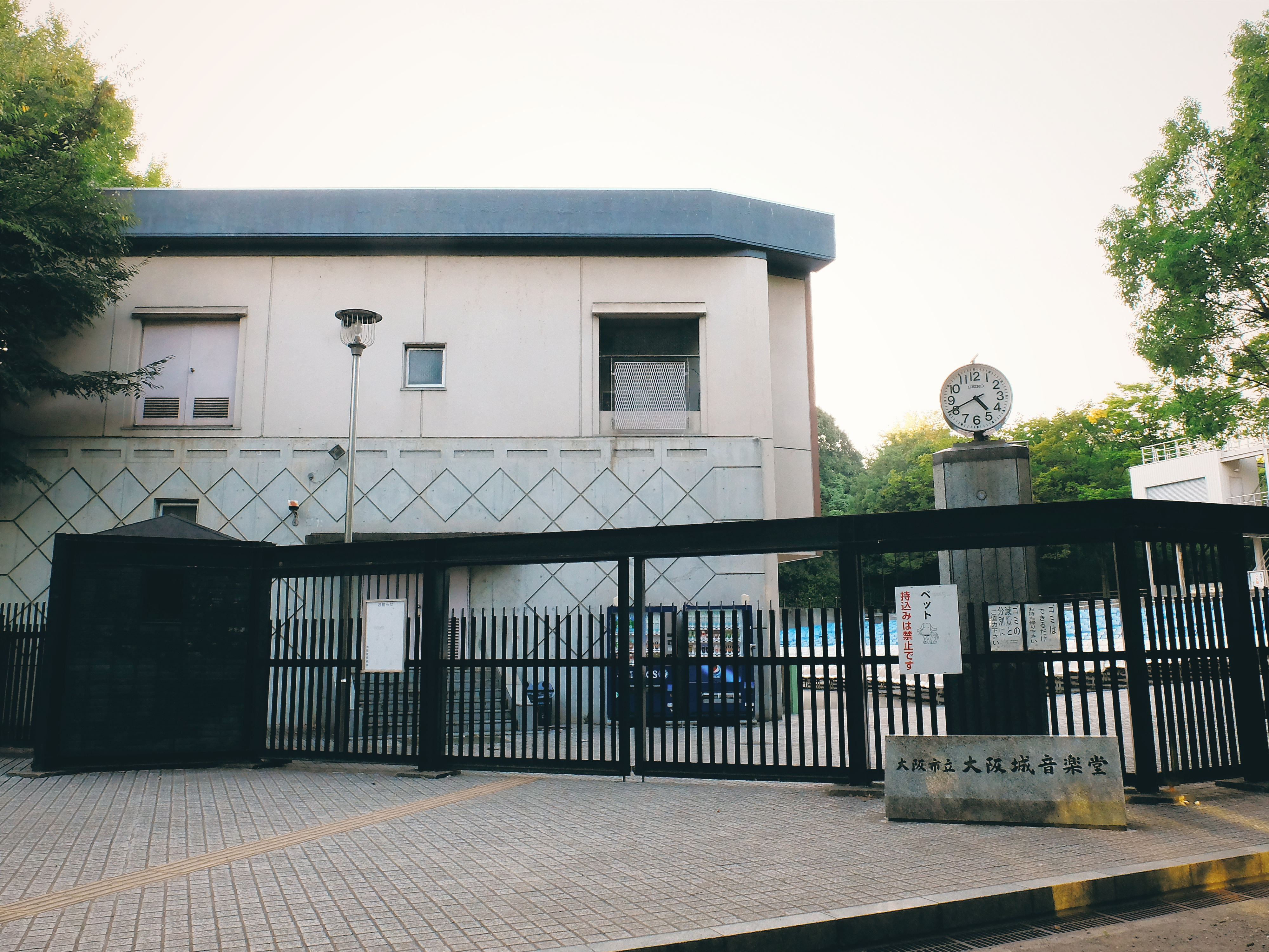 大阪城音楽堂、正面入口